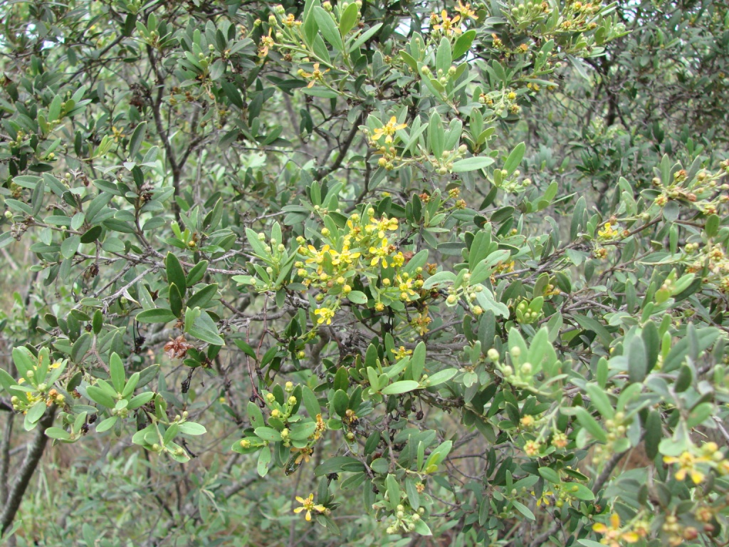 Tetrapterys microphylla - MALPIGHIACEAE - Parque Nacional da Chapada dos Veadeiros - Cavalcante - Goiás - Brasil.